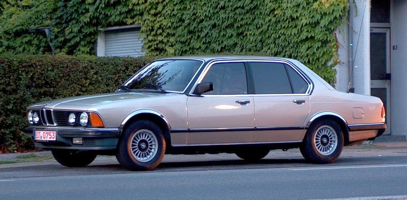 BMW E23 / 735i WerksKAT - 136KW - Bj 1985